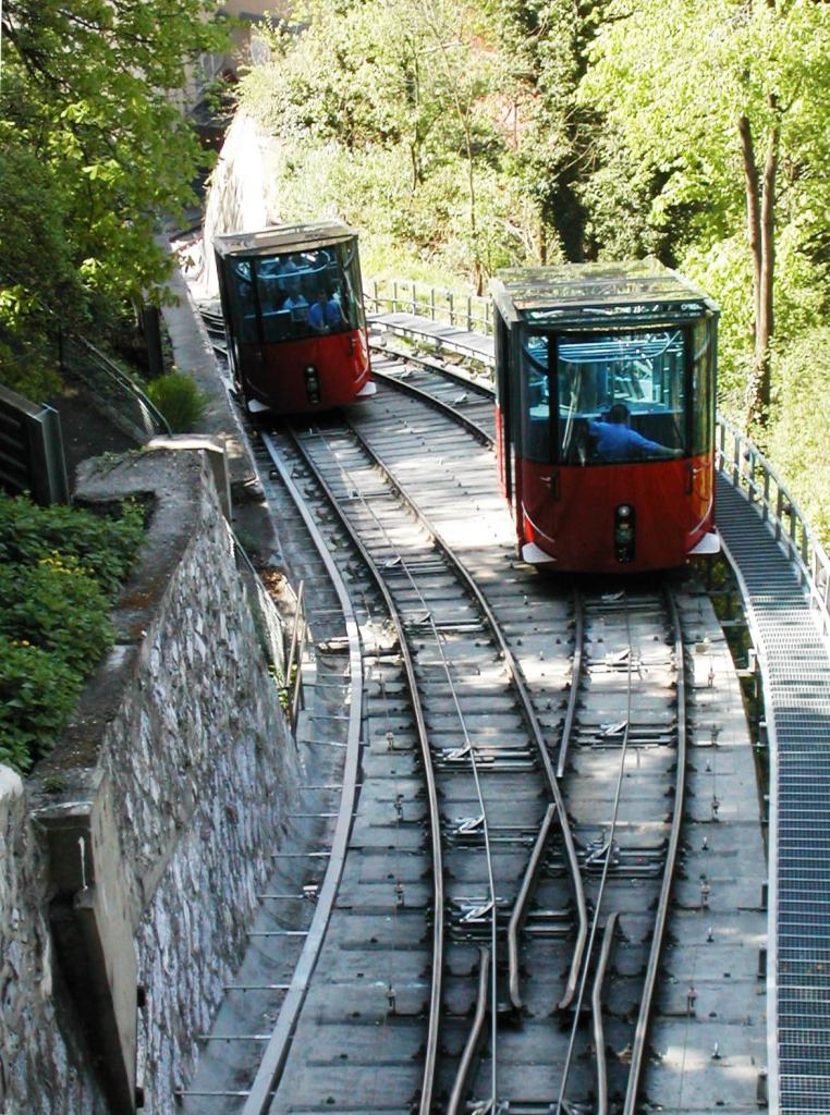 Grazer Schloßbergbahn: Wagenbegegung